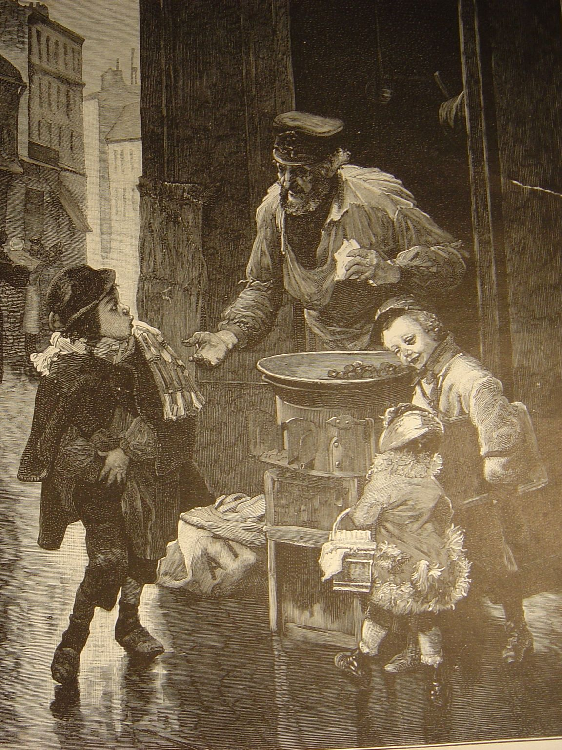 Le marchand de marrons, à la grande joie de nos écoliers et écolières qui viennent faire cercle autour du chaudron brûlant. Le gamin a eu l'audace, sans posséder un centime de commander. Mais le vieux bonhomme a le nez fin et ne veut lâcher le paquet qu'en échange de sonnant. Les deux compagnons rient de la mésaventure de leur camarade et cela d'un de ces rires malins et sournois.